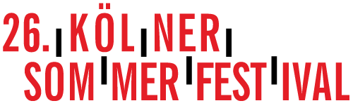 Logo-26-Koelner-Sommerfestival CMYK